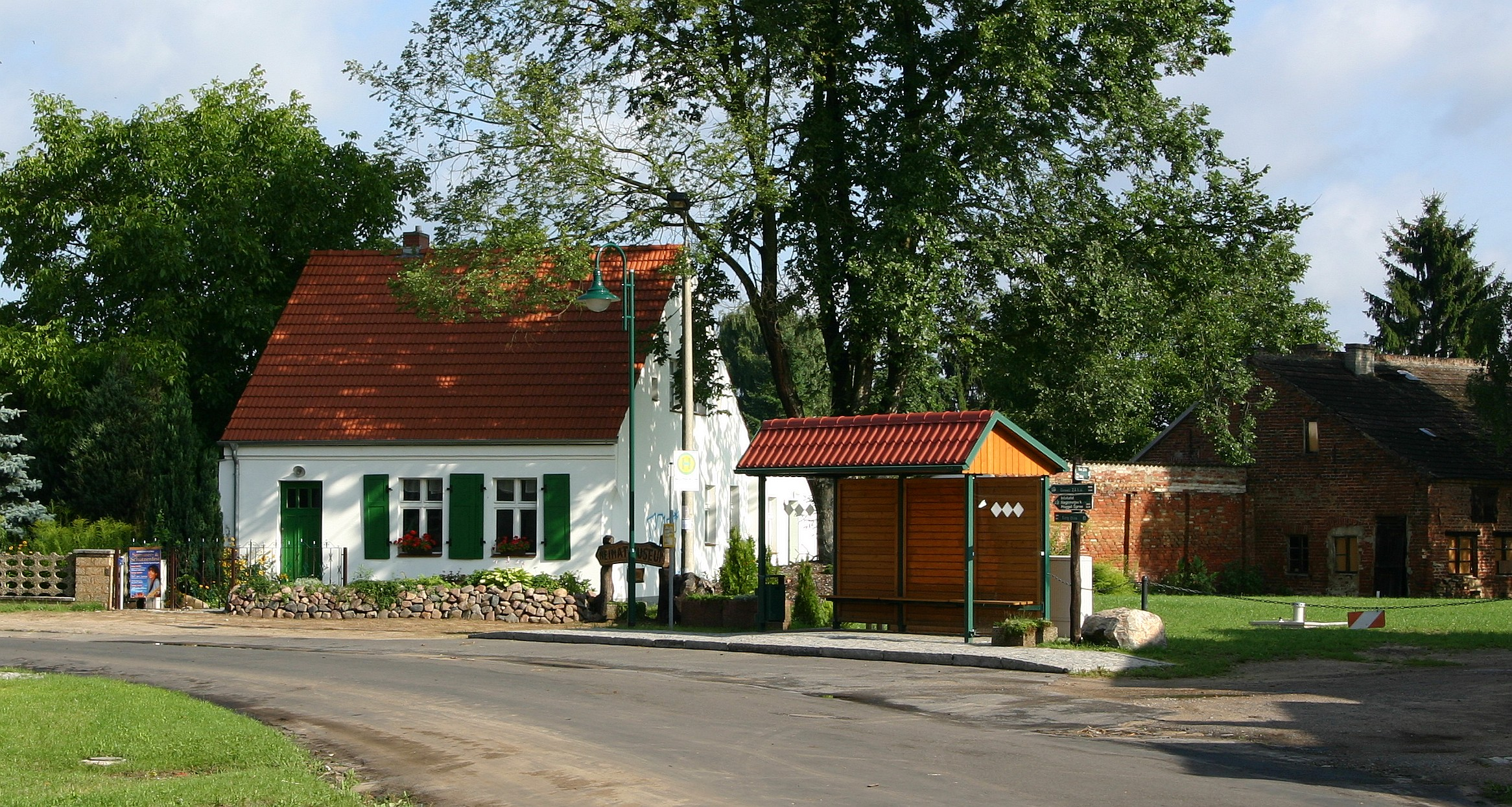 Heimatmuseum von Neu Zittau, Deutschland.